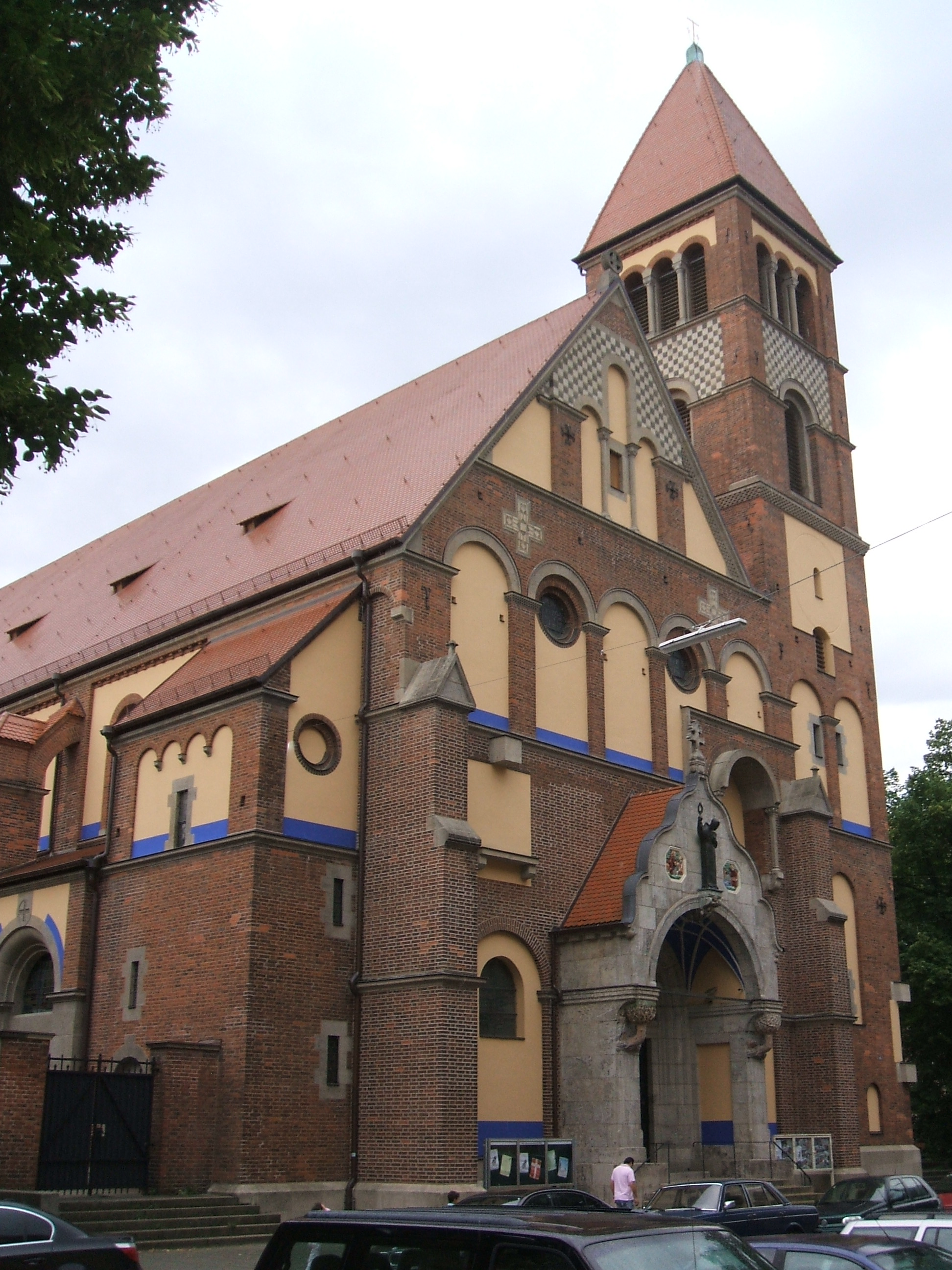 Katholische Pfarrkirche St. Anton Nürnberg-Gostenhof